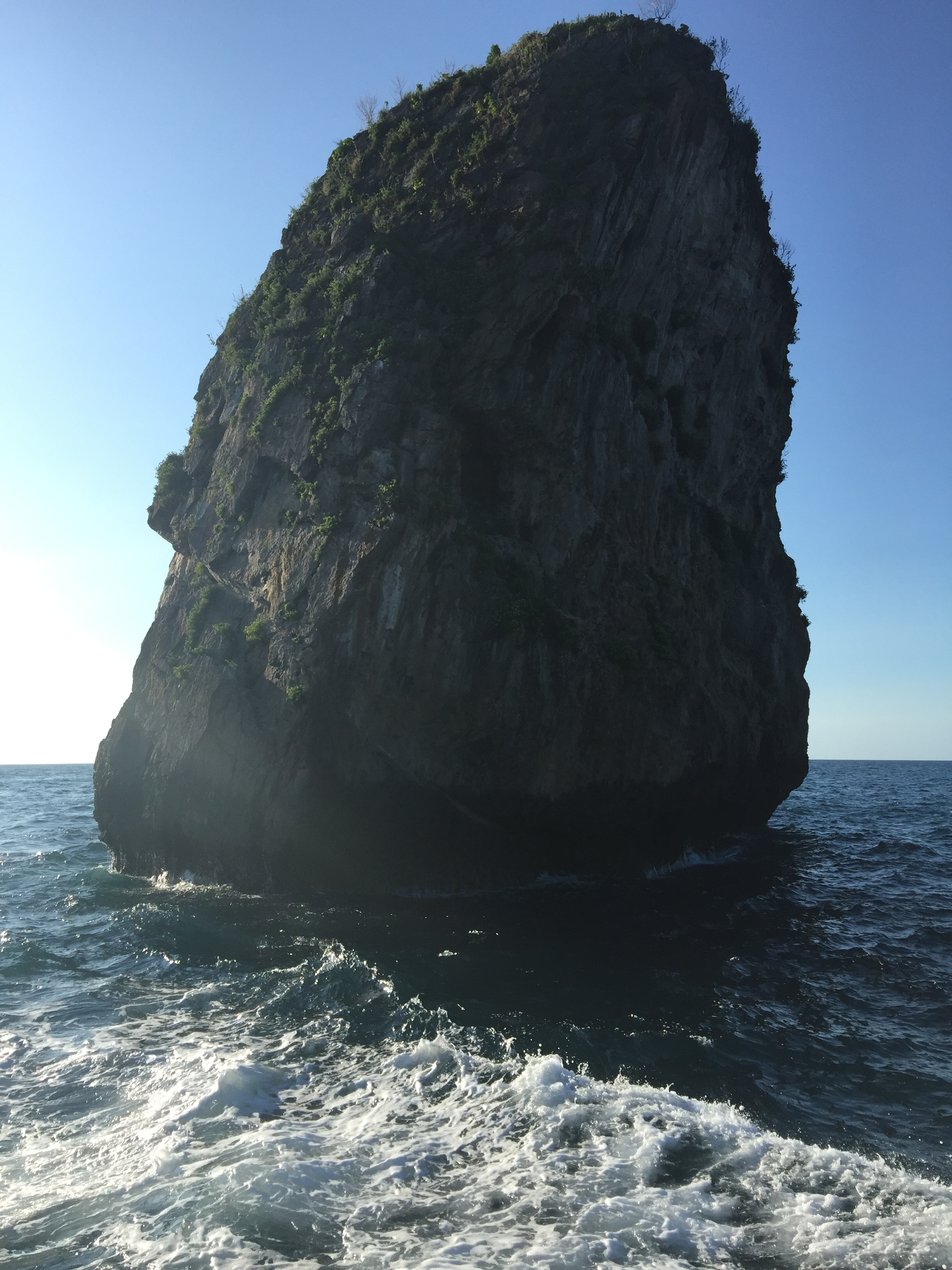 Detalle del Palo de Poo